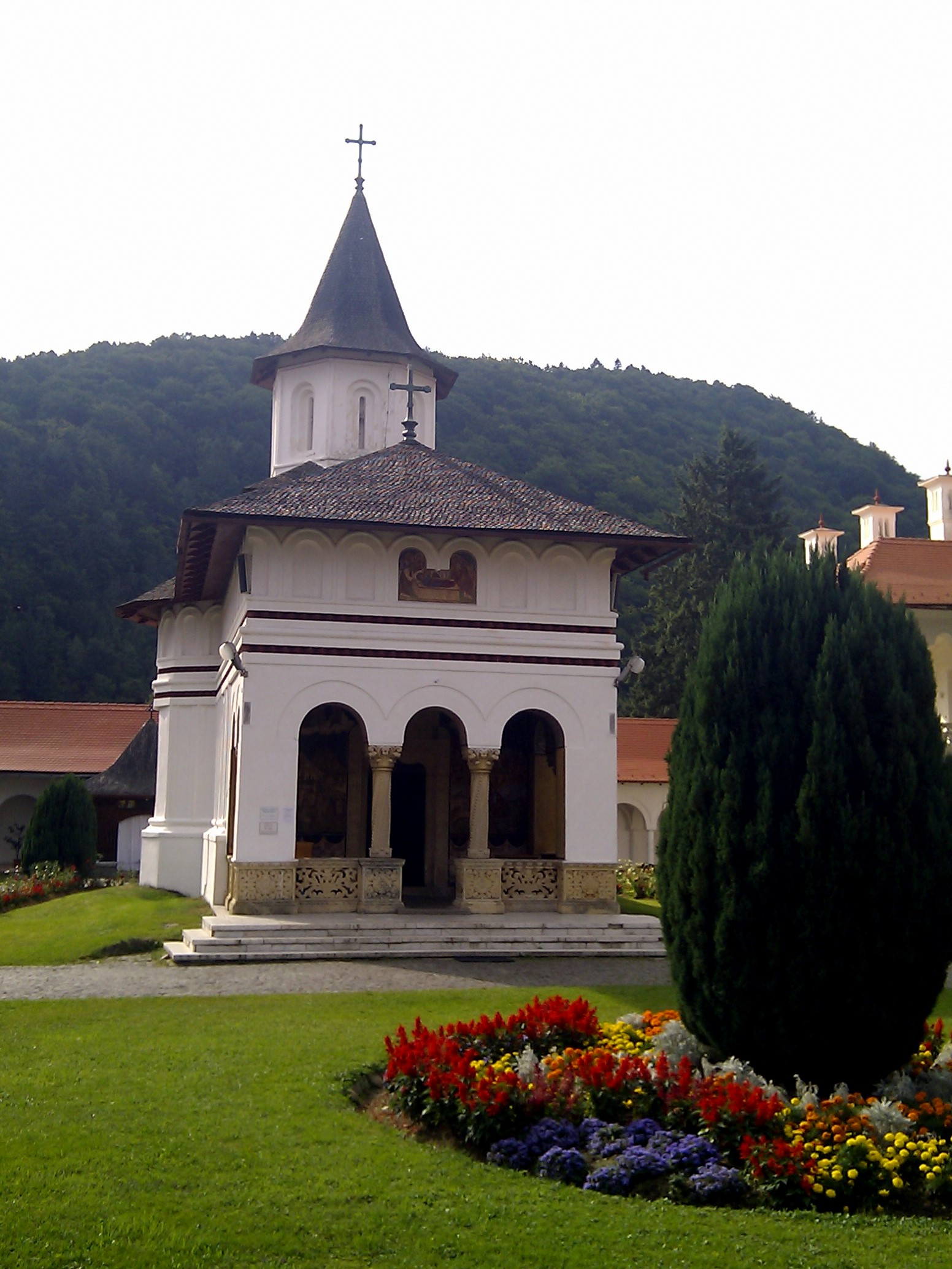 Biserica cu hramul "Adormirea Maicii Domnului", Mănăstirea Brâncoveanu - Sâmbata de Sus 01